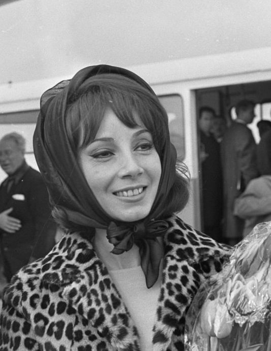 Andréa Parisy à l'aéroport d'Amsterdam en mars 1967